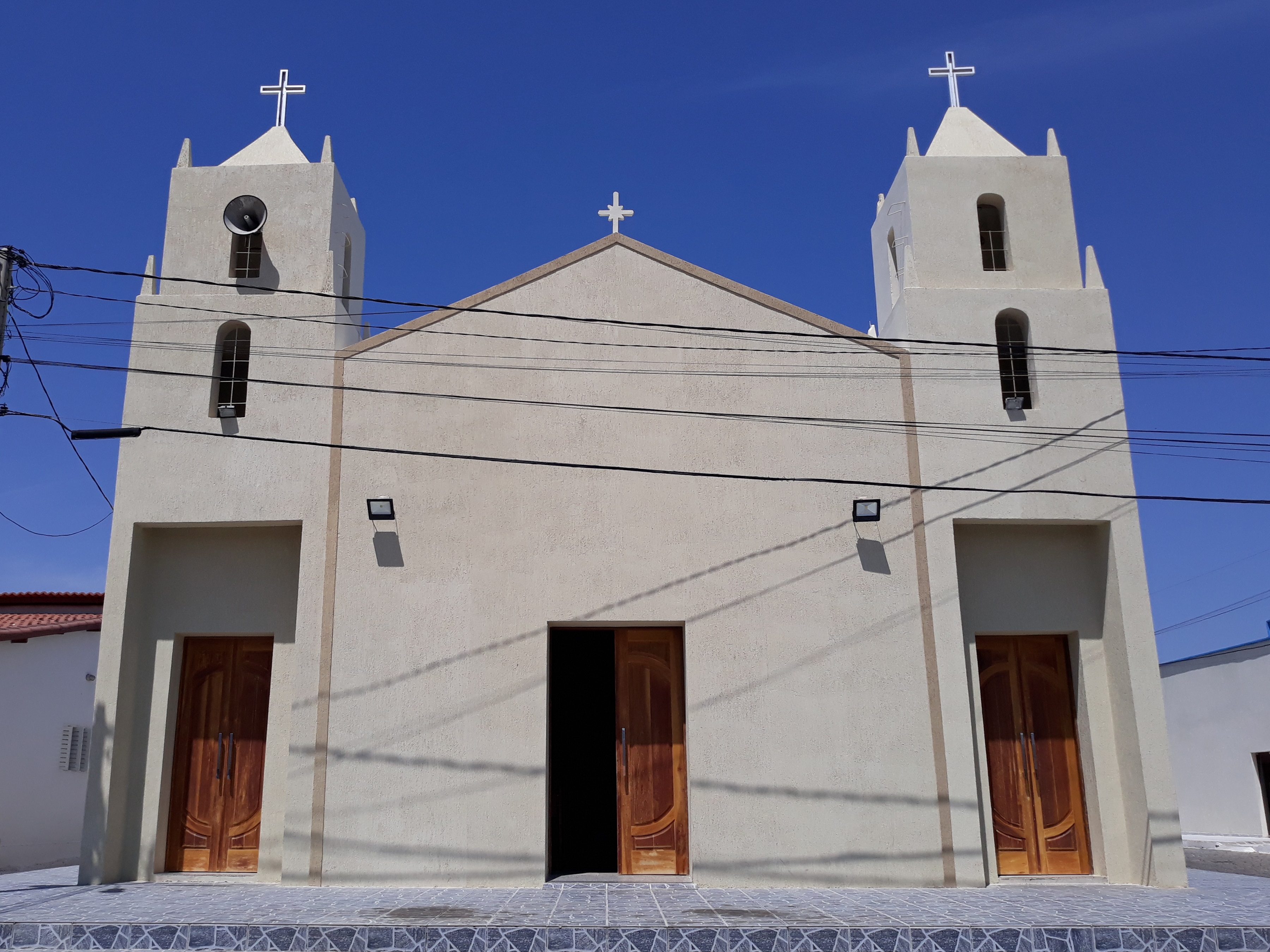 Igreja Matriz de São Francisco de Assis, padroeiro de São Francisco do Oeste, Rio Grande do Norte (Brasil)